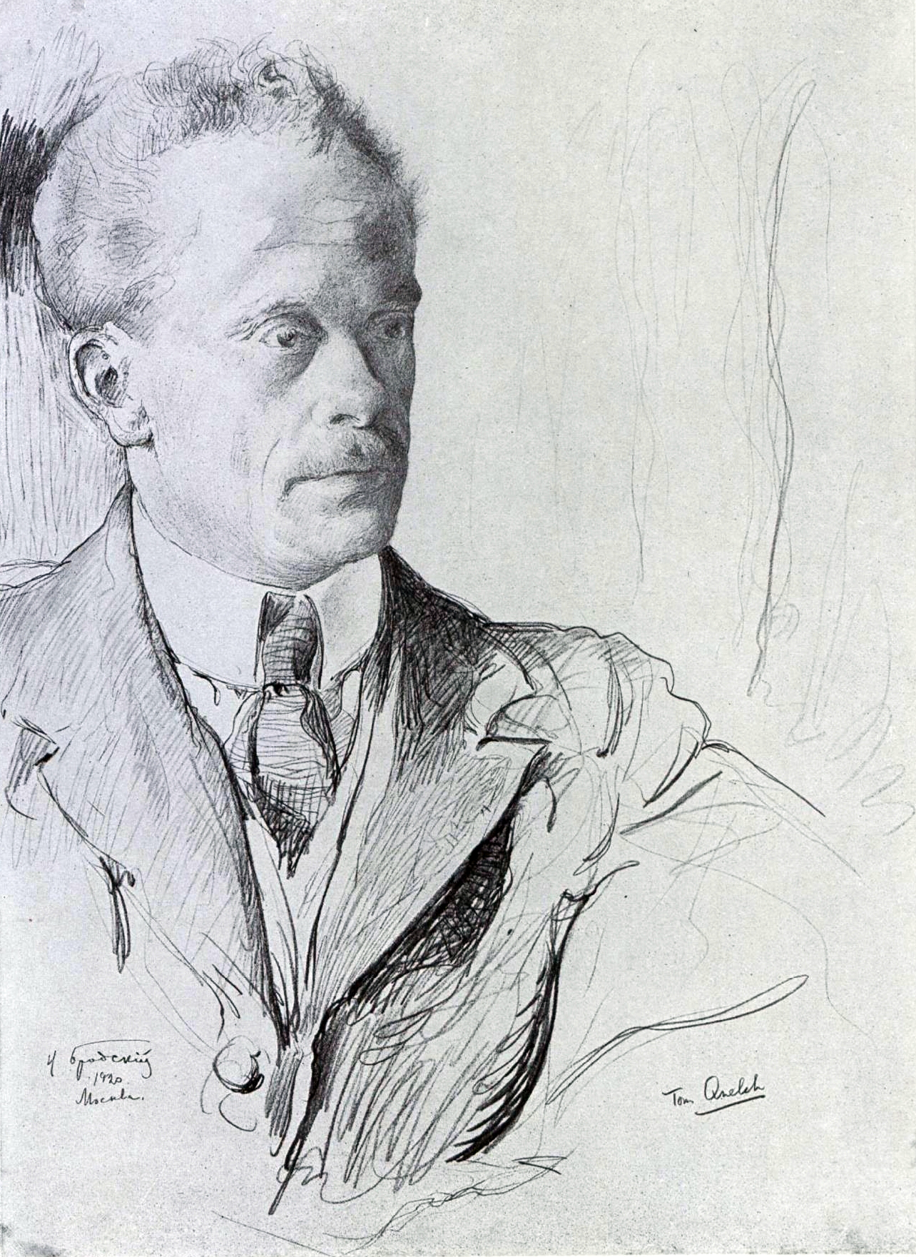 Квелч, Том